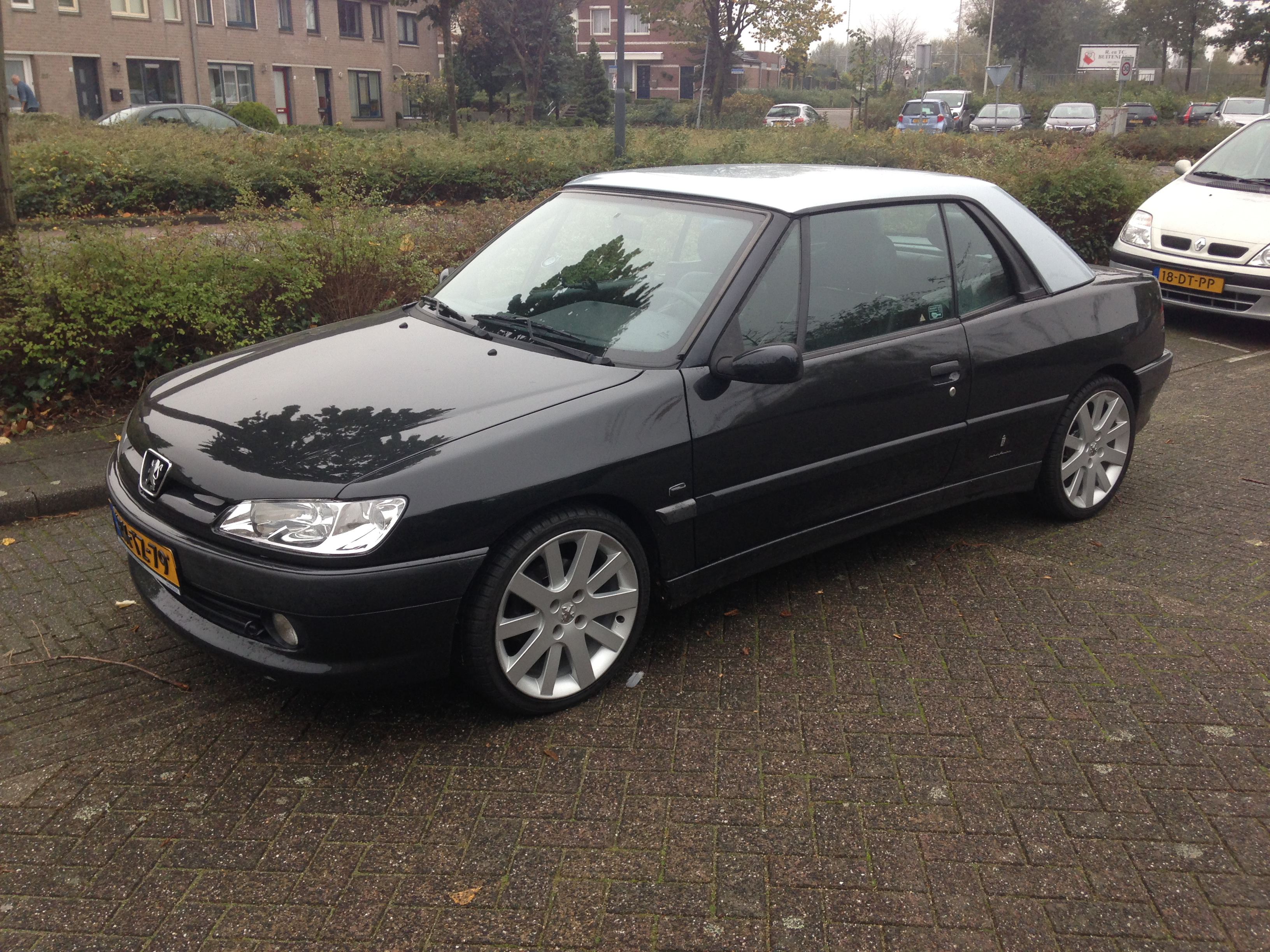 306 With hardtop 17" Hockenheim rims